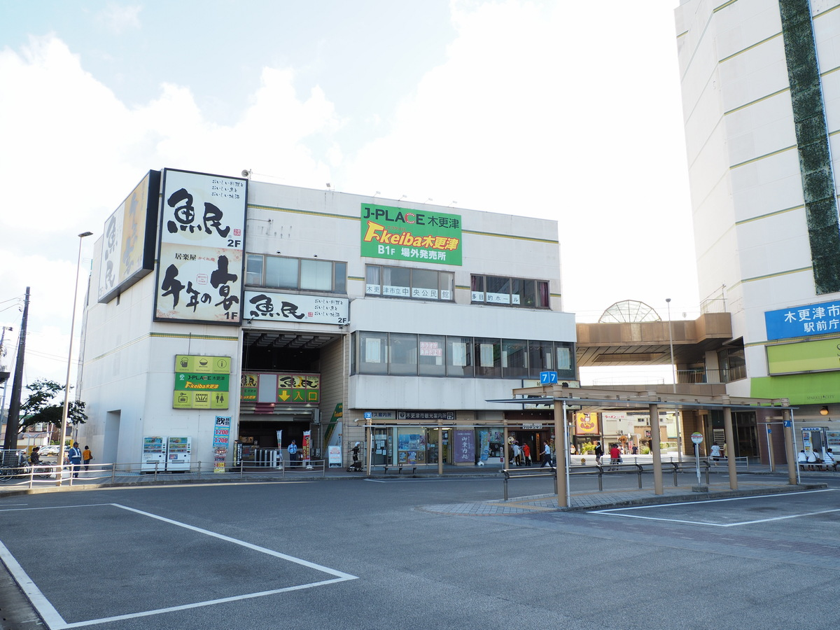 スパークルシティ木更津の別館（アクア木更津B館）の外観。